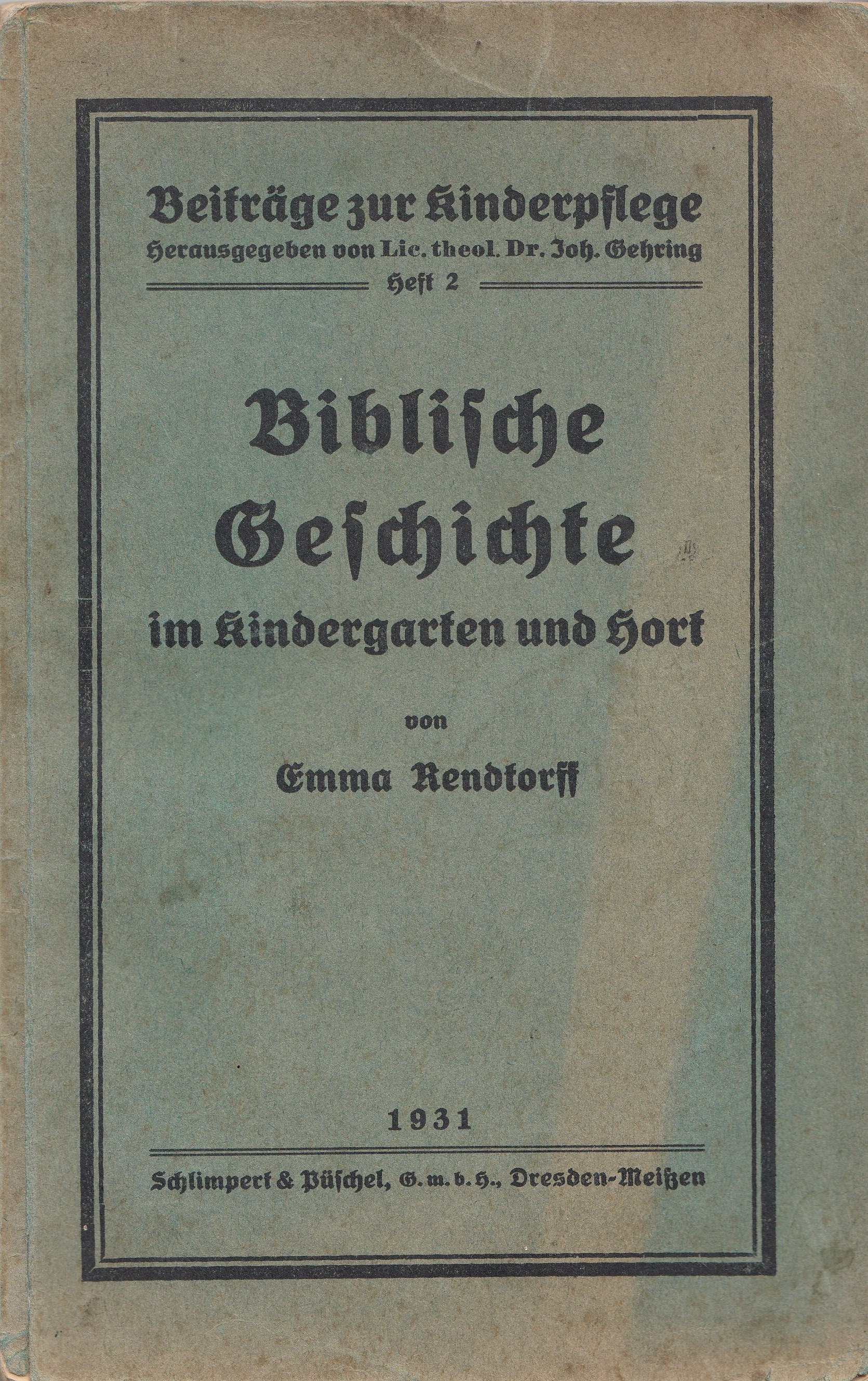 Biblische Geschichten, Fachbuch von Emma Rendtorff